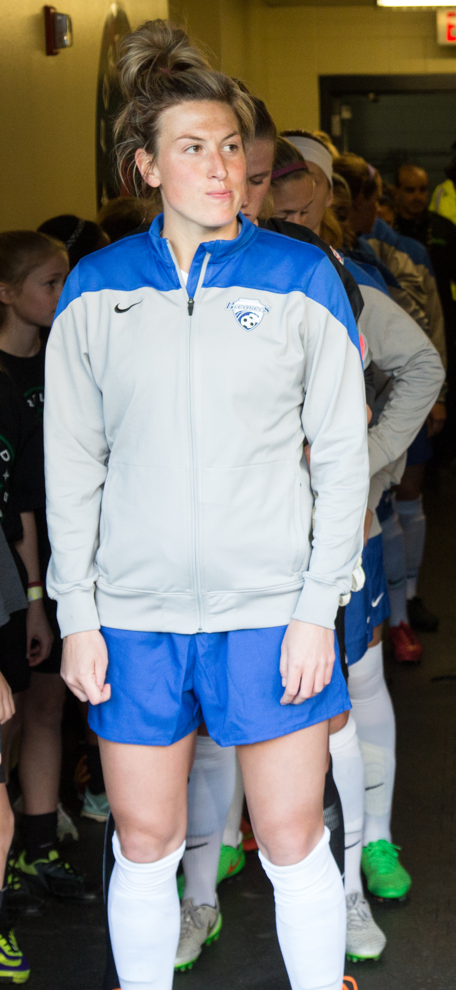 N42A2182